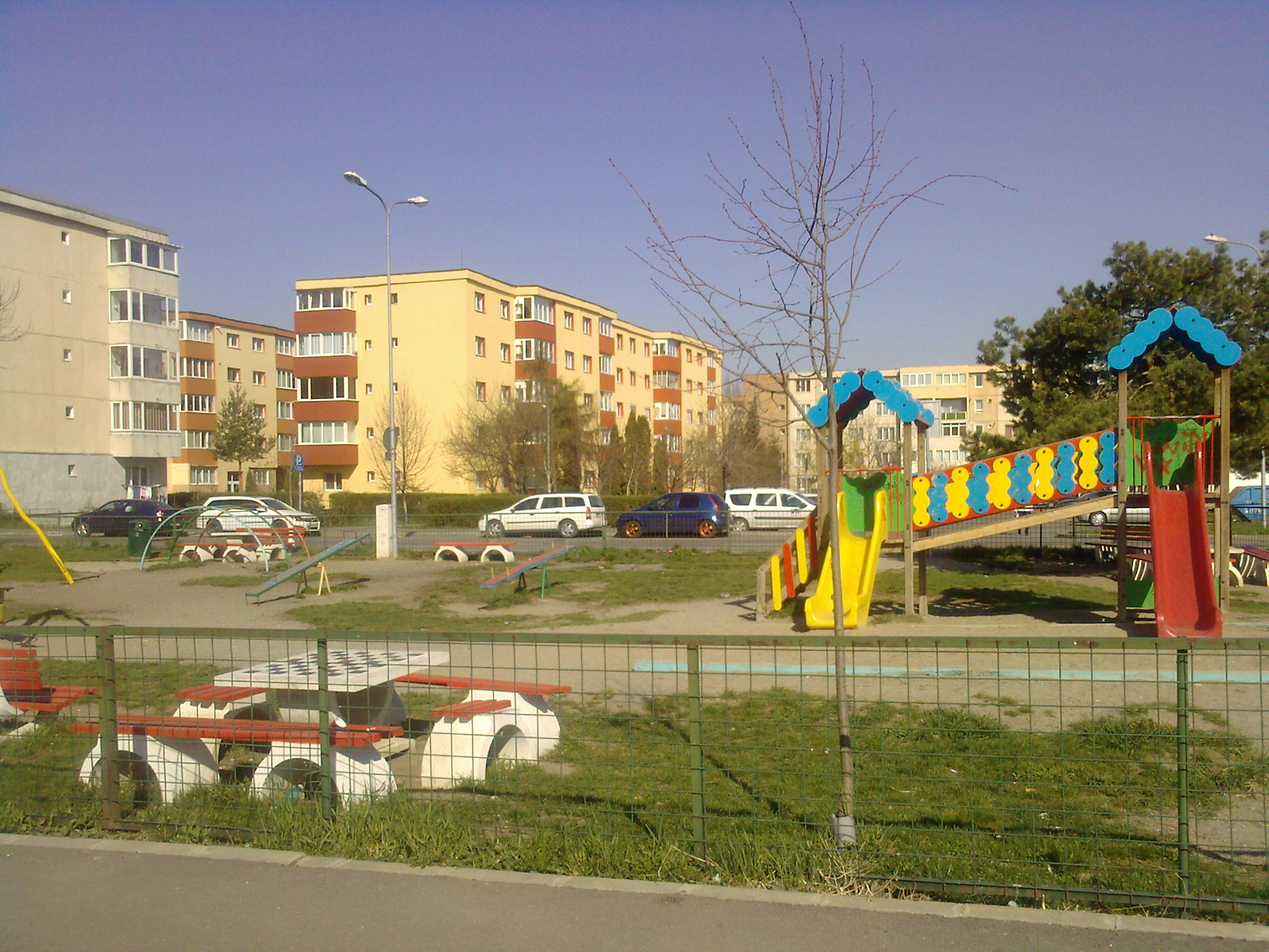 Cartierul Triaj, Braşov, România